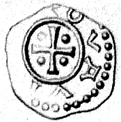 Halb-Pfennig-Brakteat aus der Zeit des Condominiums der Magnussöhne Olav, Øystein und Sigurd Jórsalafari. Könige in Norwegen 1103-1115. Text: OVAVI (=Olav) (rex ergänzt aus Ol-Øys-Sig_9) 0,171 g. Feinghalt 875 ‰.